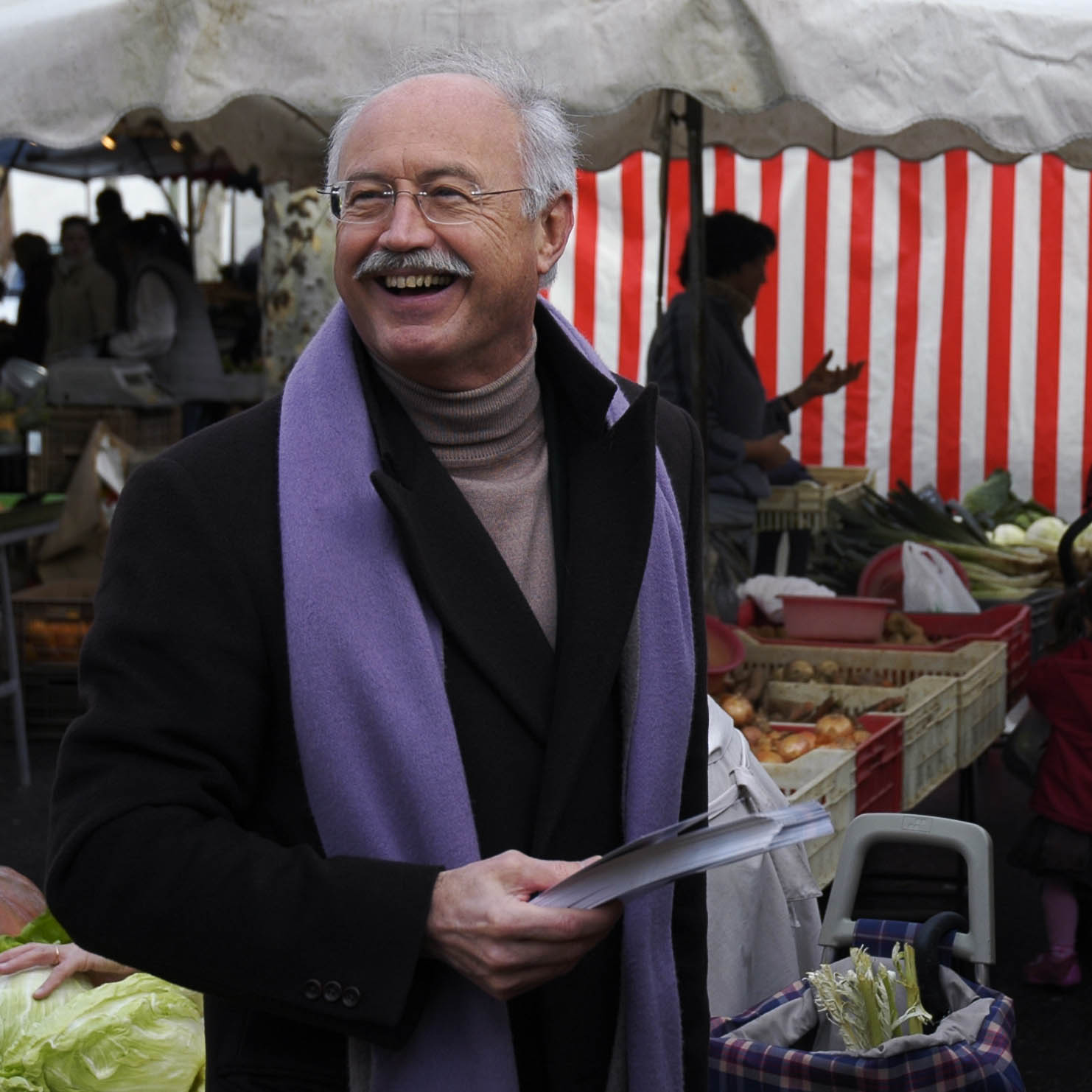 Jean-Louis Touraine